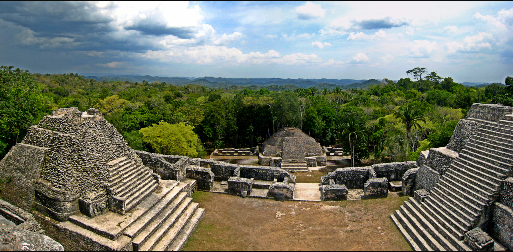 Panorama_atop_Caracol